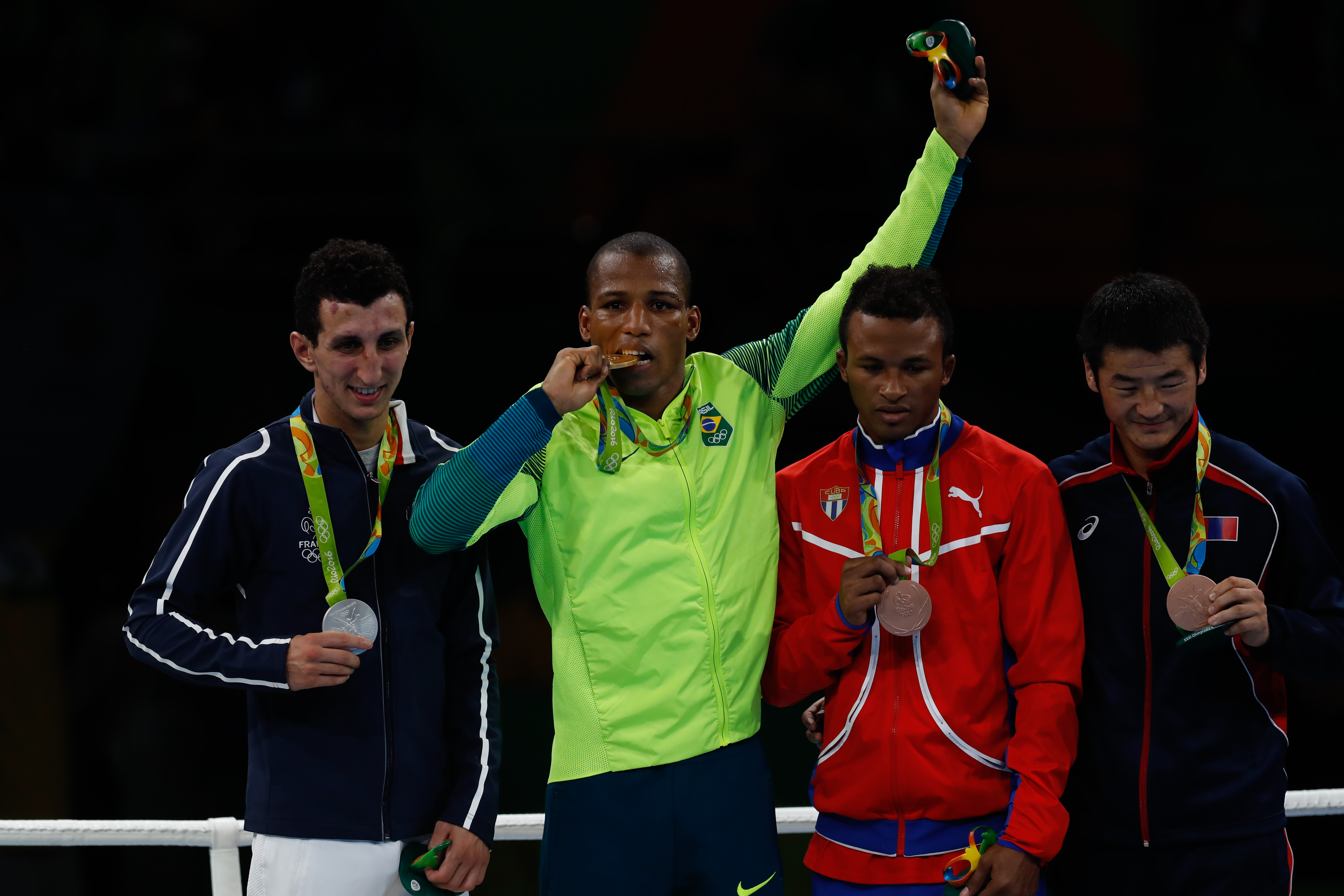 Rio de Janeiro - Por decisão unânime dos juízes, o lutador brasileiro Robson Conceição derrotou o francês Sofiane Oumiha e garantiu o ouro na categoria peso ligeiro, até 60 quilos (Fernando Frazão/Agência Brasil)